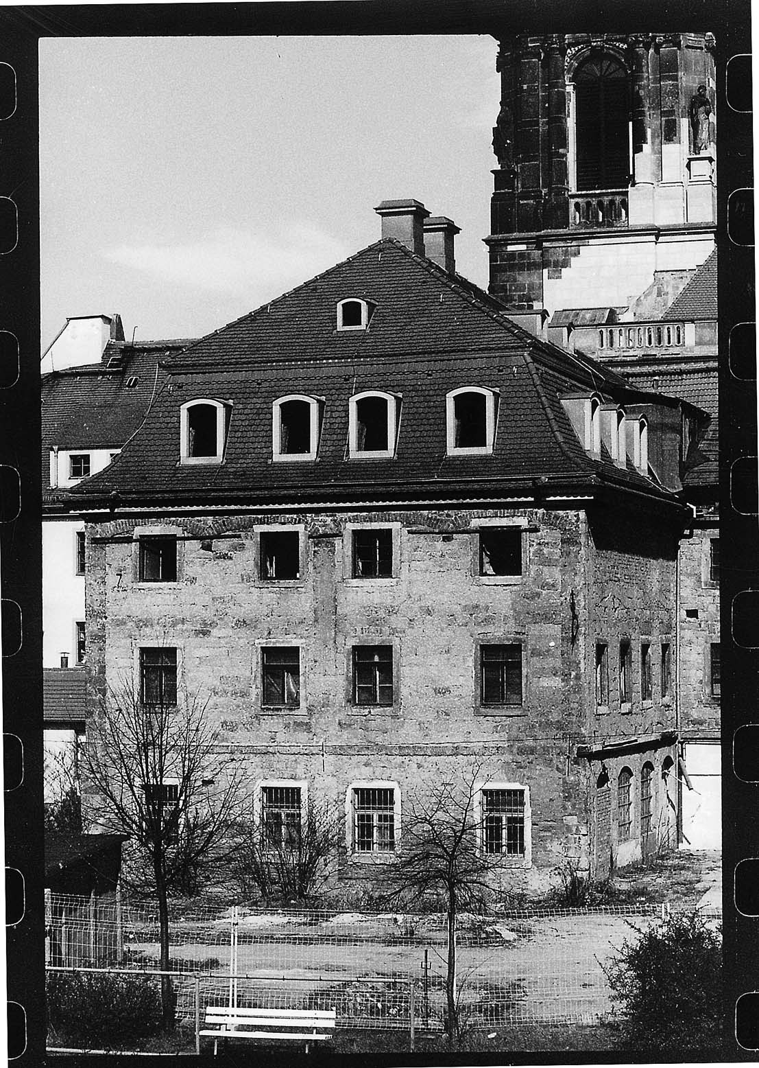 Theater alt